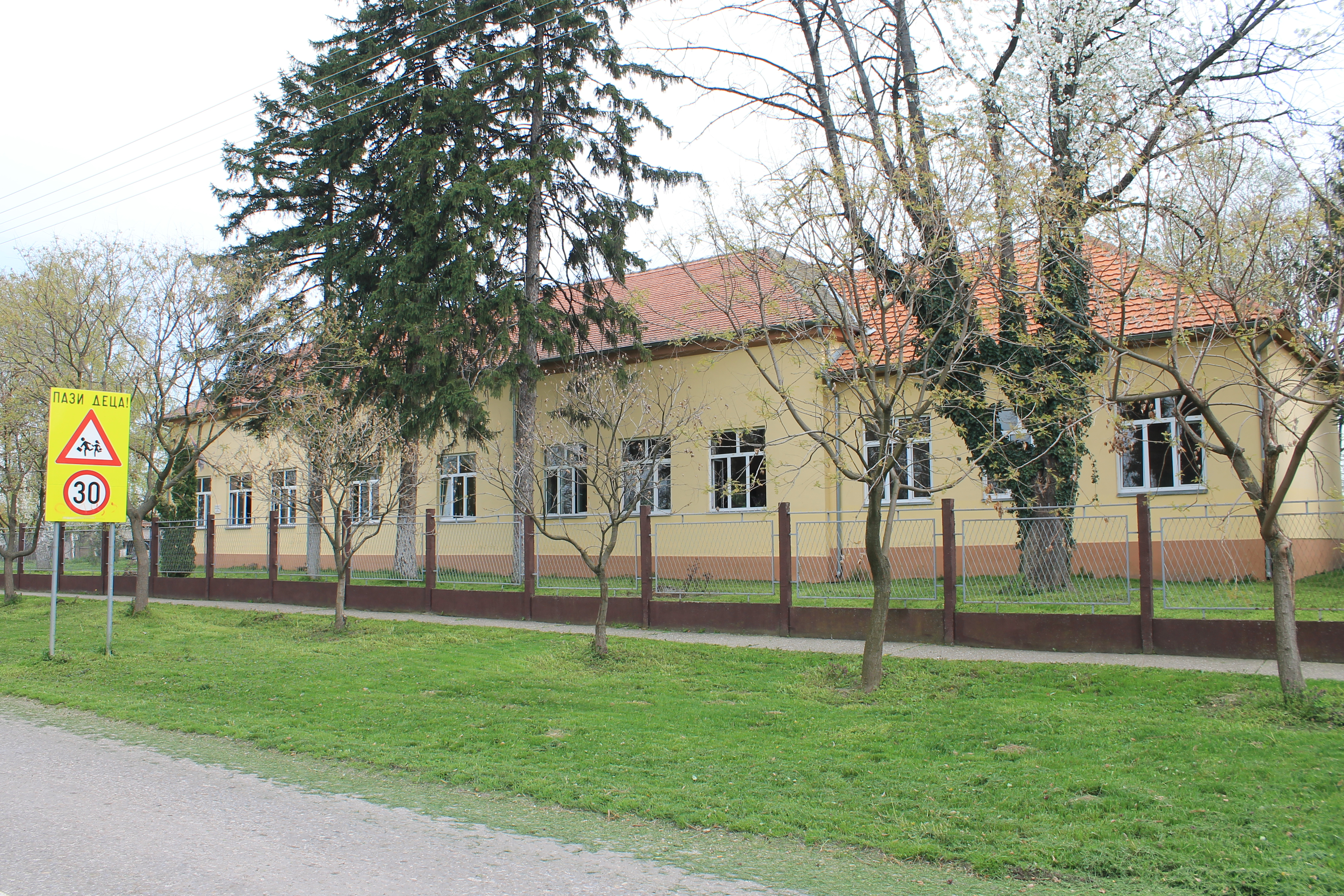 Čalma